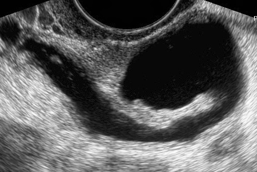 Left hydrosalpinx by gynecological ultrasonography